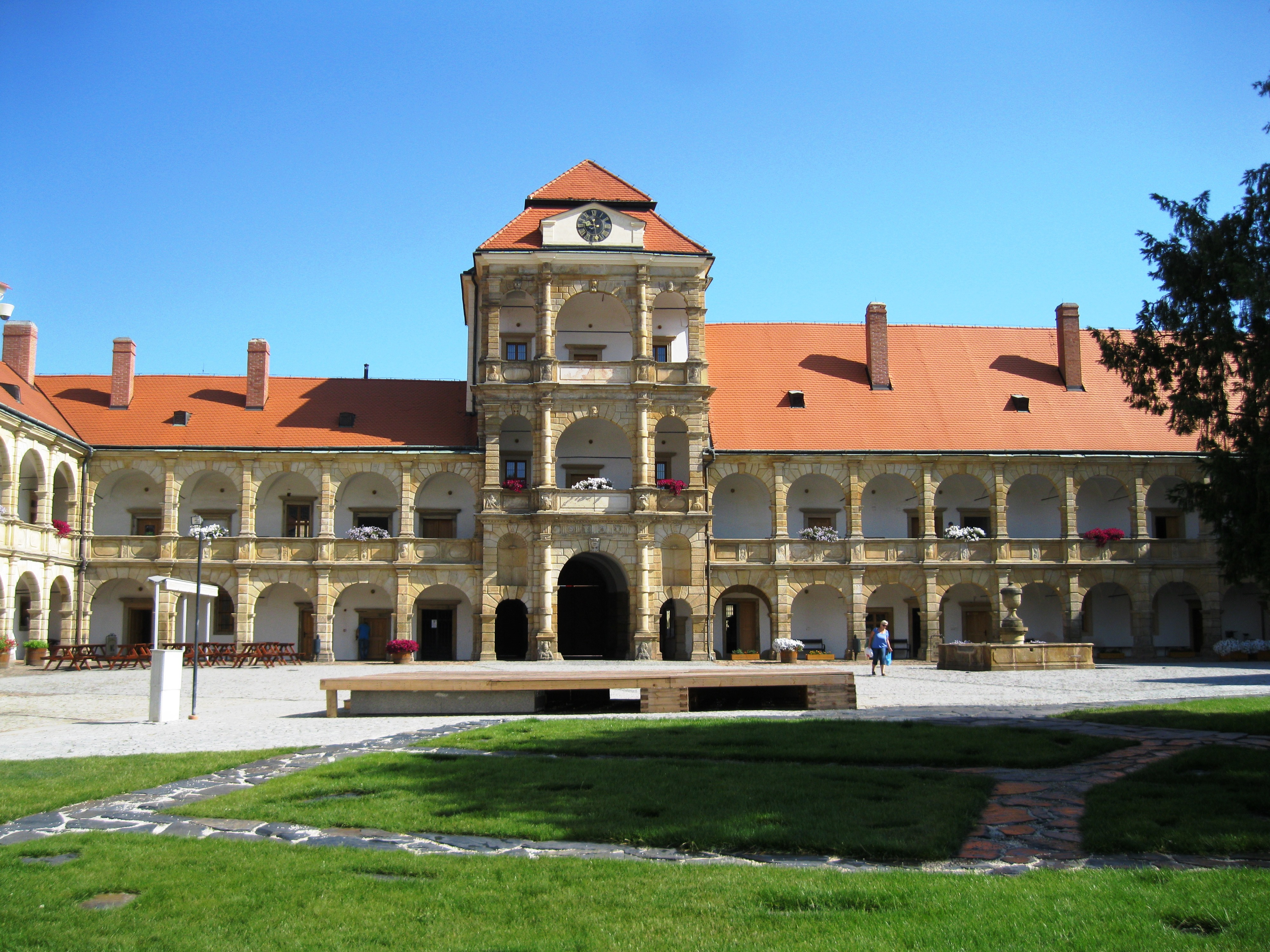 Zámek Moravská Třebová, Zámecké nám. 185/1, Moravská Třebová